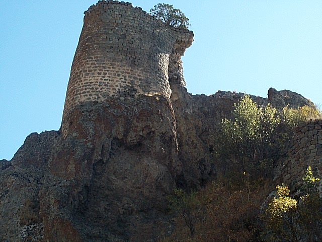 ԱՄՐՈՑ «ԿԱՔԱՎԱԲԵՐԴ» («ԹԱԹՈՒԼԻ ԲԵՐԴ») 98.6/1